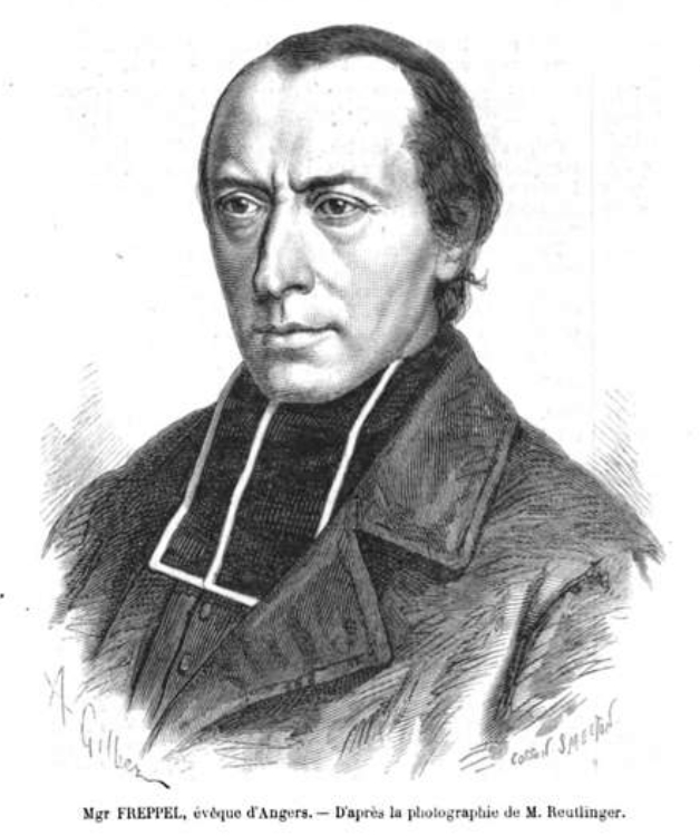 Mgr Freppel, à sa nomination comme évêque d'Angers.